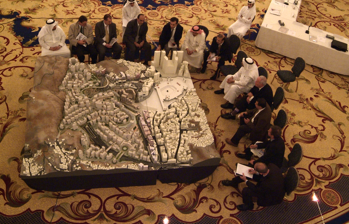 Sitzung eines Preisgerichts im Rahmen eines Wettbewerbs in Saudi Arabien - Moderation durch das Wettbewerbsmanagement